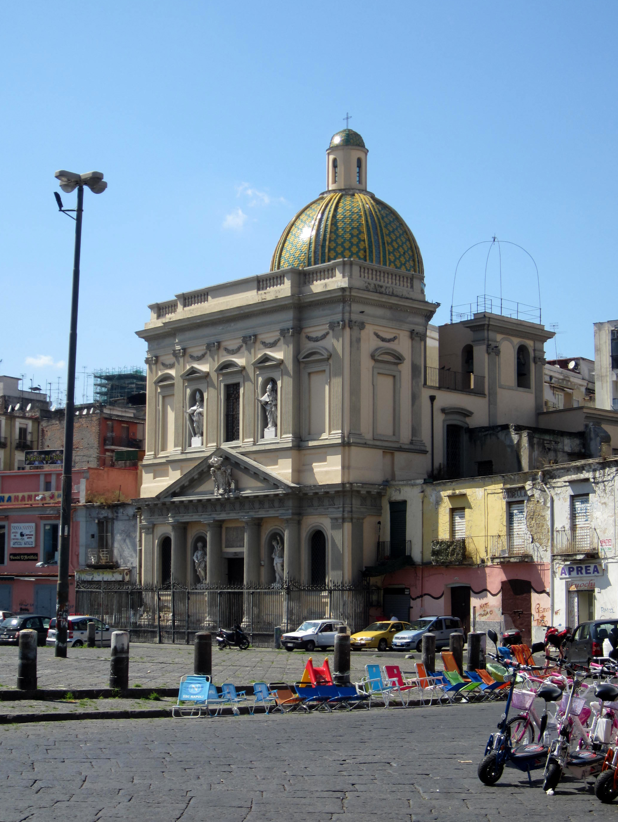 Chiesa di Santa Croce e Purgatorio al Mercato in Piazza Mercato a Napoli